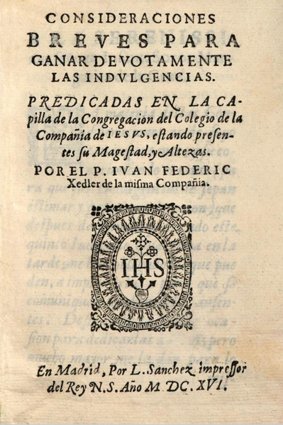 Portada del libro "Consideraciones breves para ganar devotamente las indulgencias predicadas en la capilla de la congregación del colegio de la Compañía de Jesús", de Juan Federico Gedler. Publicado en Madrid, en 1616, en la imprenta de Luis Sánchez.